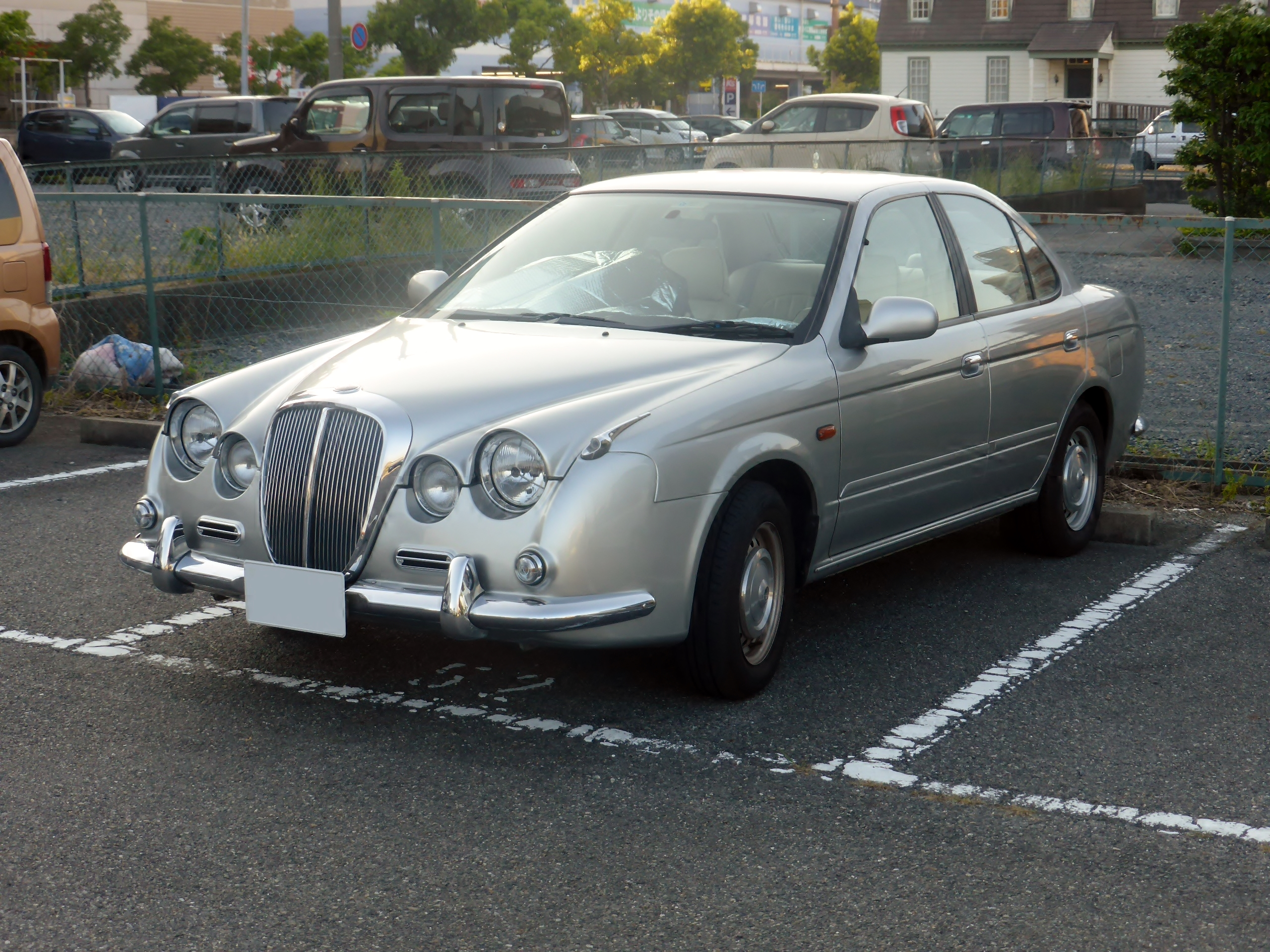 2代目光岡・リョーガをフロントから撮影。